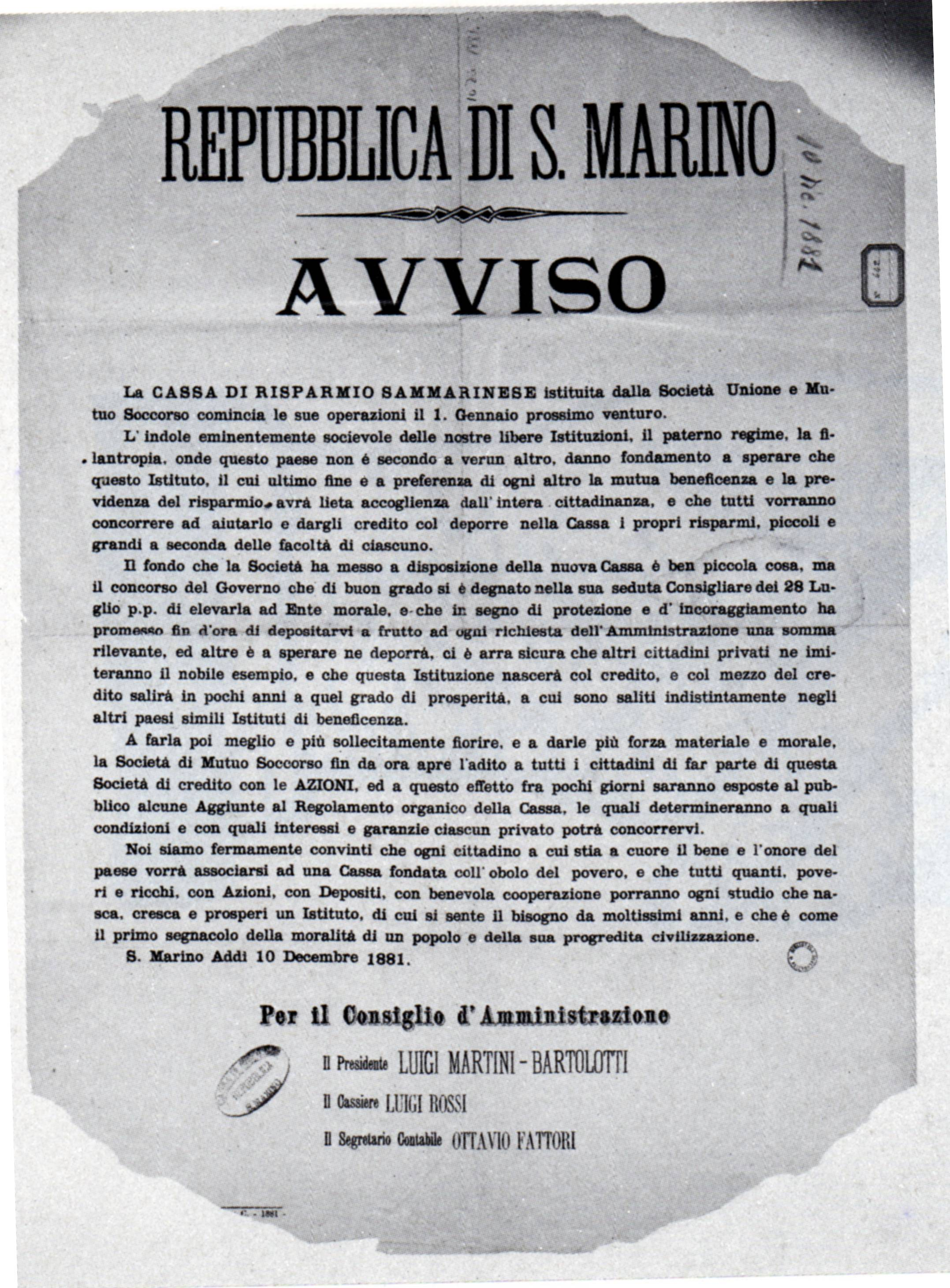 Avviso della nascita della Cassa di Risparmio della Repubblica di San Marino - 1881